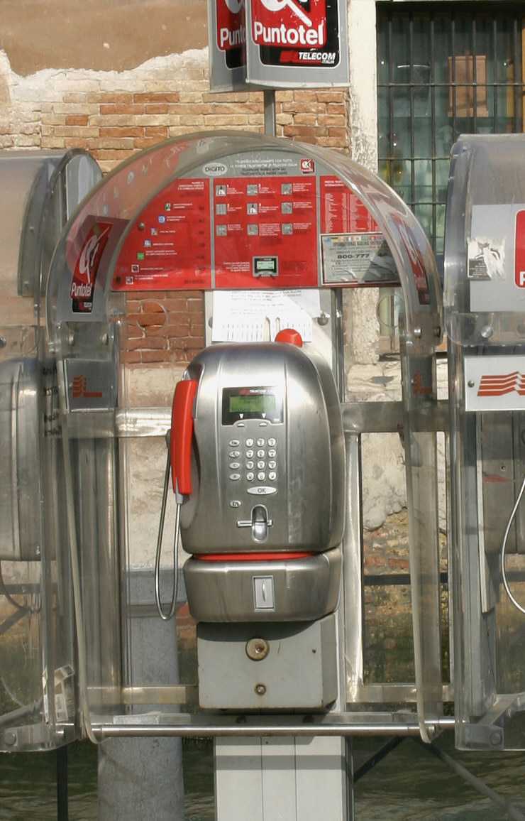 Telefono pubblico "Digito" con gettoniera della Telecom Italia a Venezia